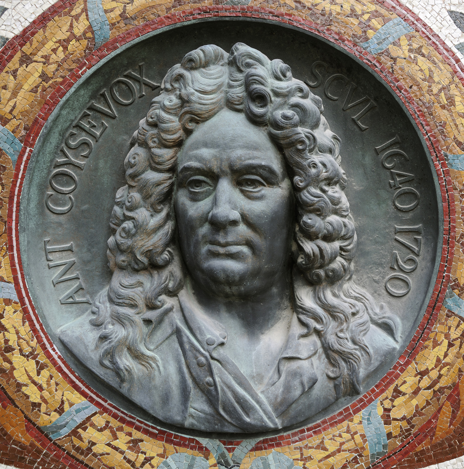 Médaillon de bronze à l'effigie d'Antoine Coysevox, réalisé par Joseph-Hugues Fabisch (1812-1886)